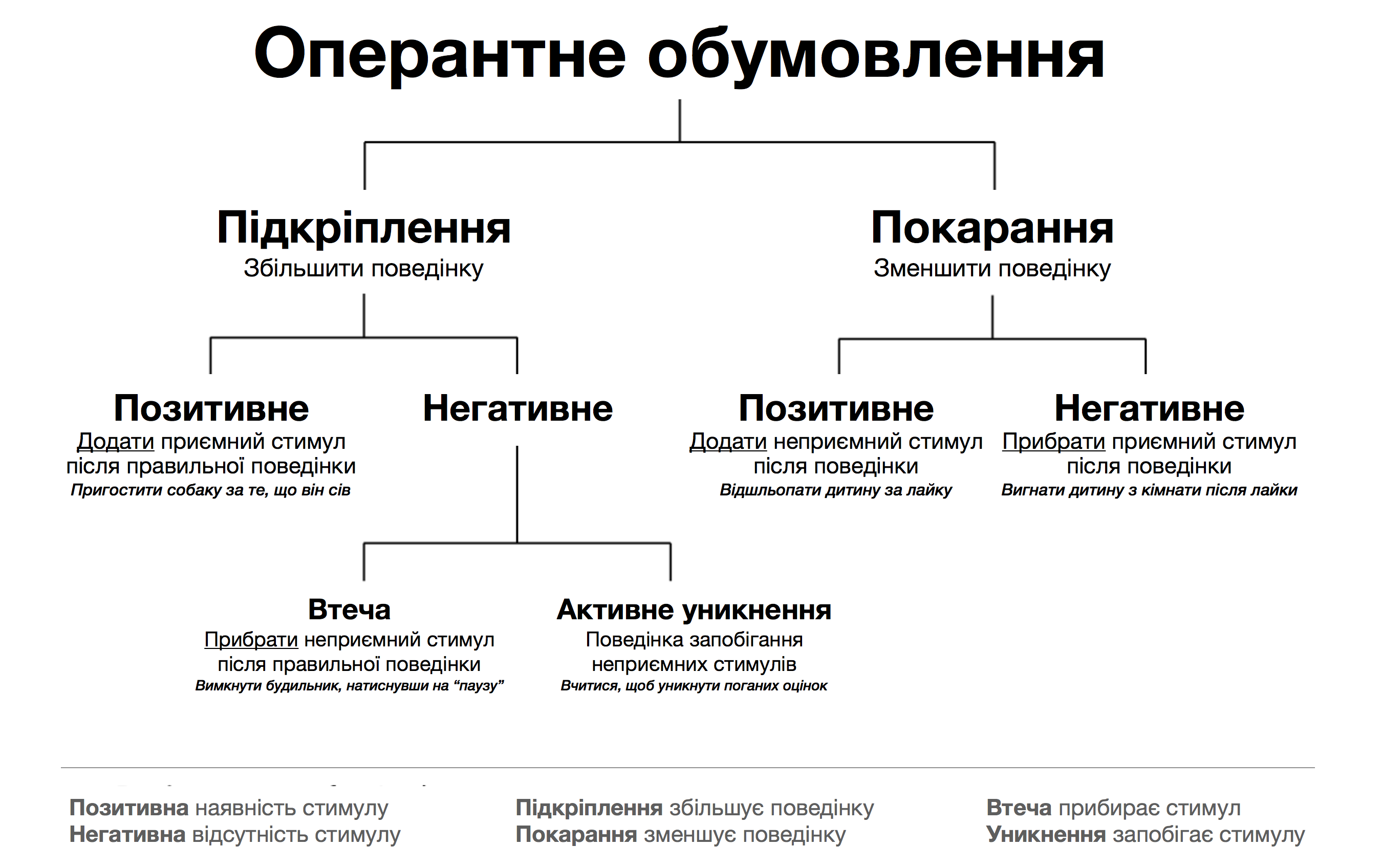 Схема оперантного обумовлення за Скіннером